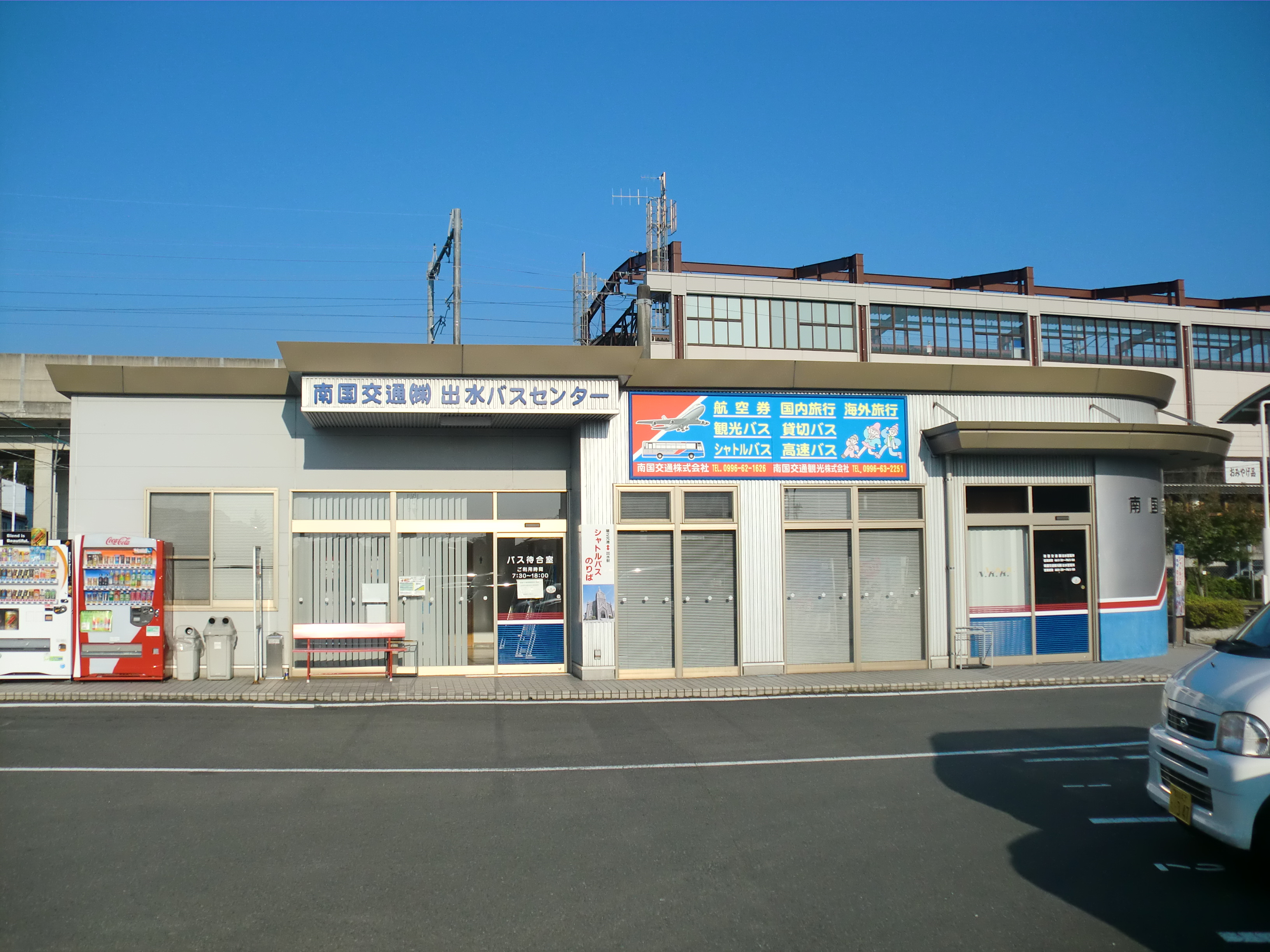 南国交通出水バスセンター兼南国交通出水営業所